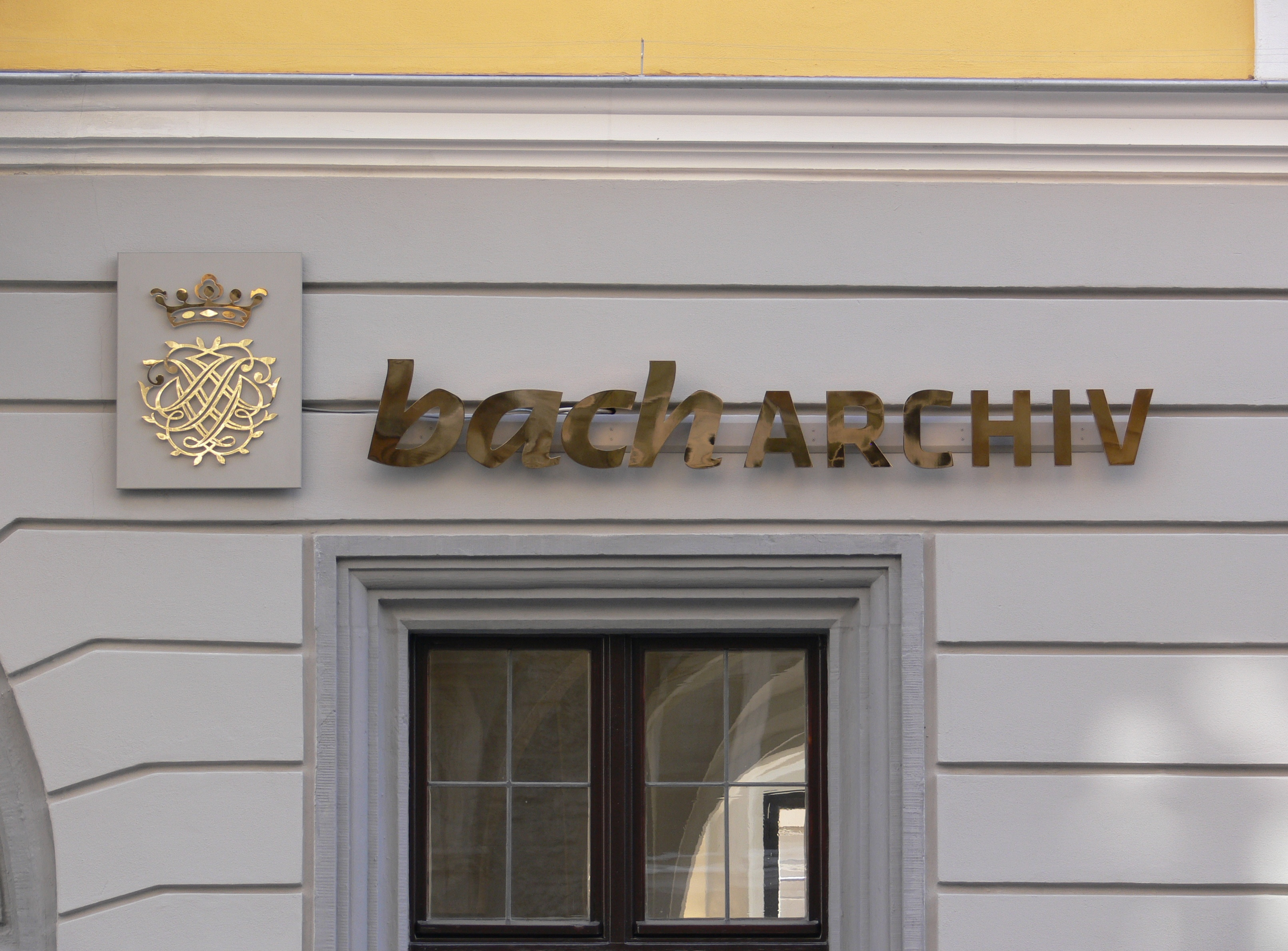 Leipzig, Bach-Archiv, Schriftzug